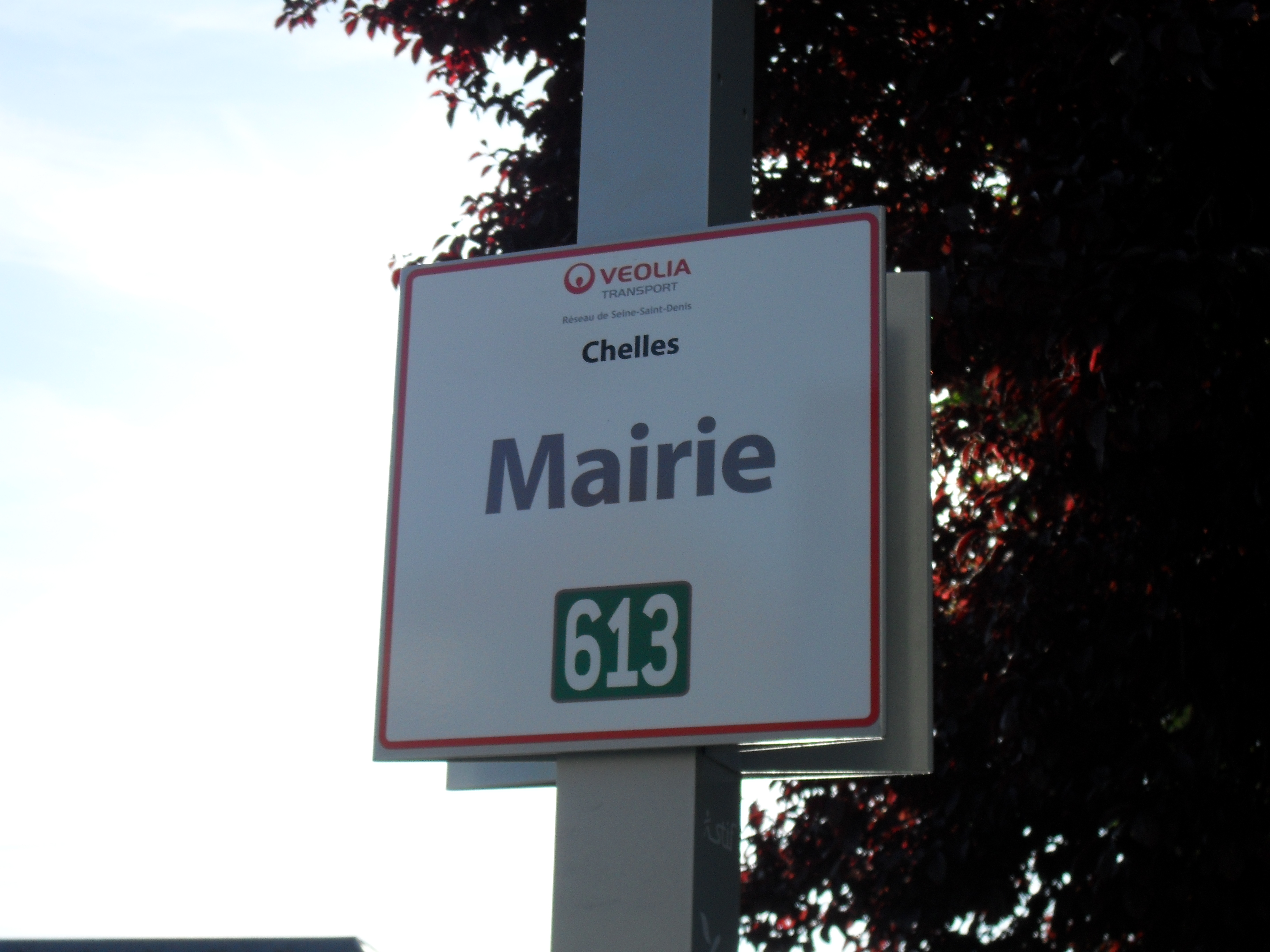 Veolia TRA 613